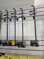 二胡的照片